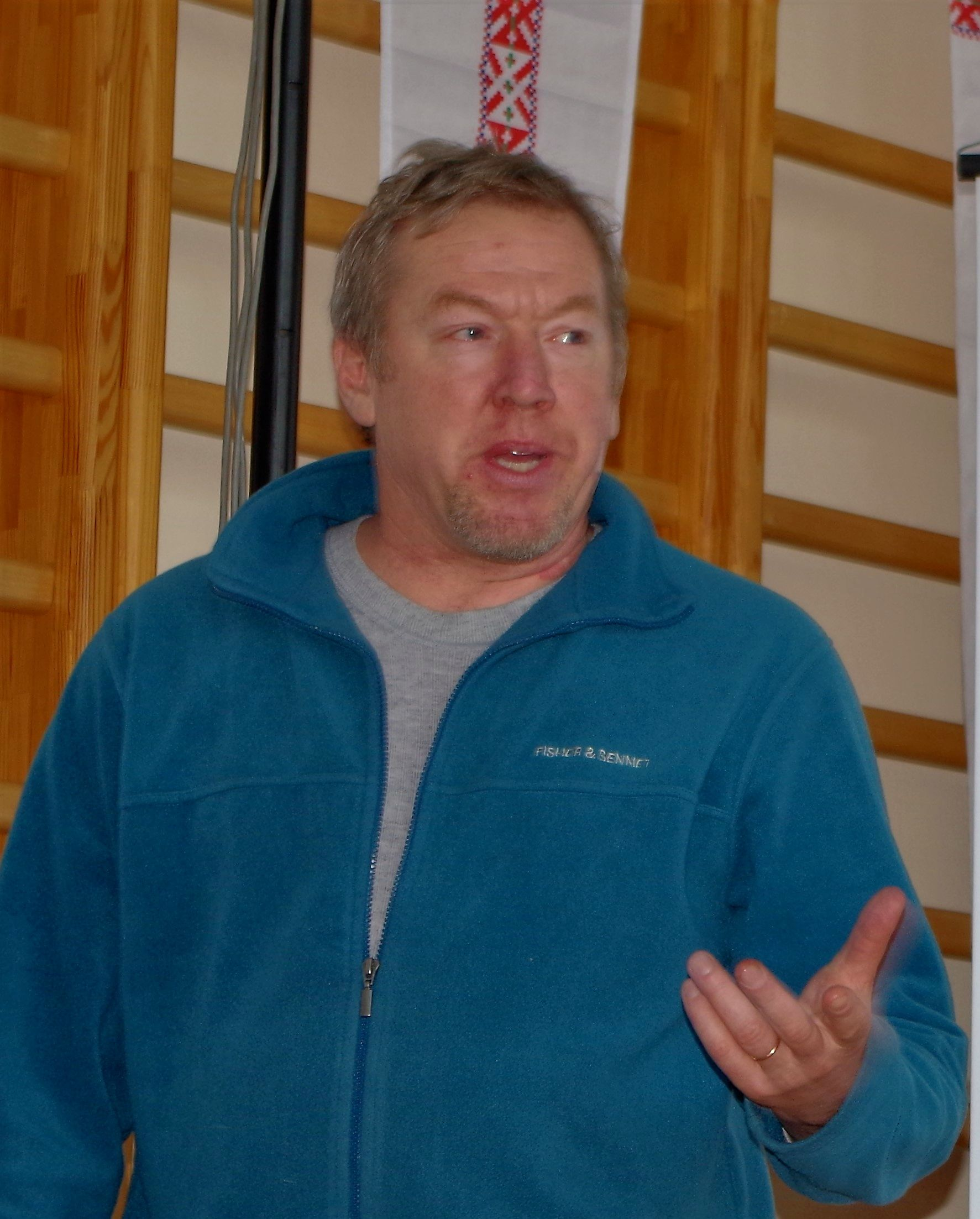 Aivar Ruukel Obinitsas soome-ugri külade foorumil